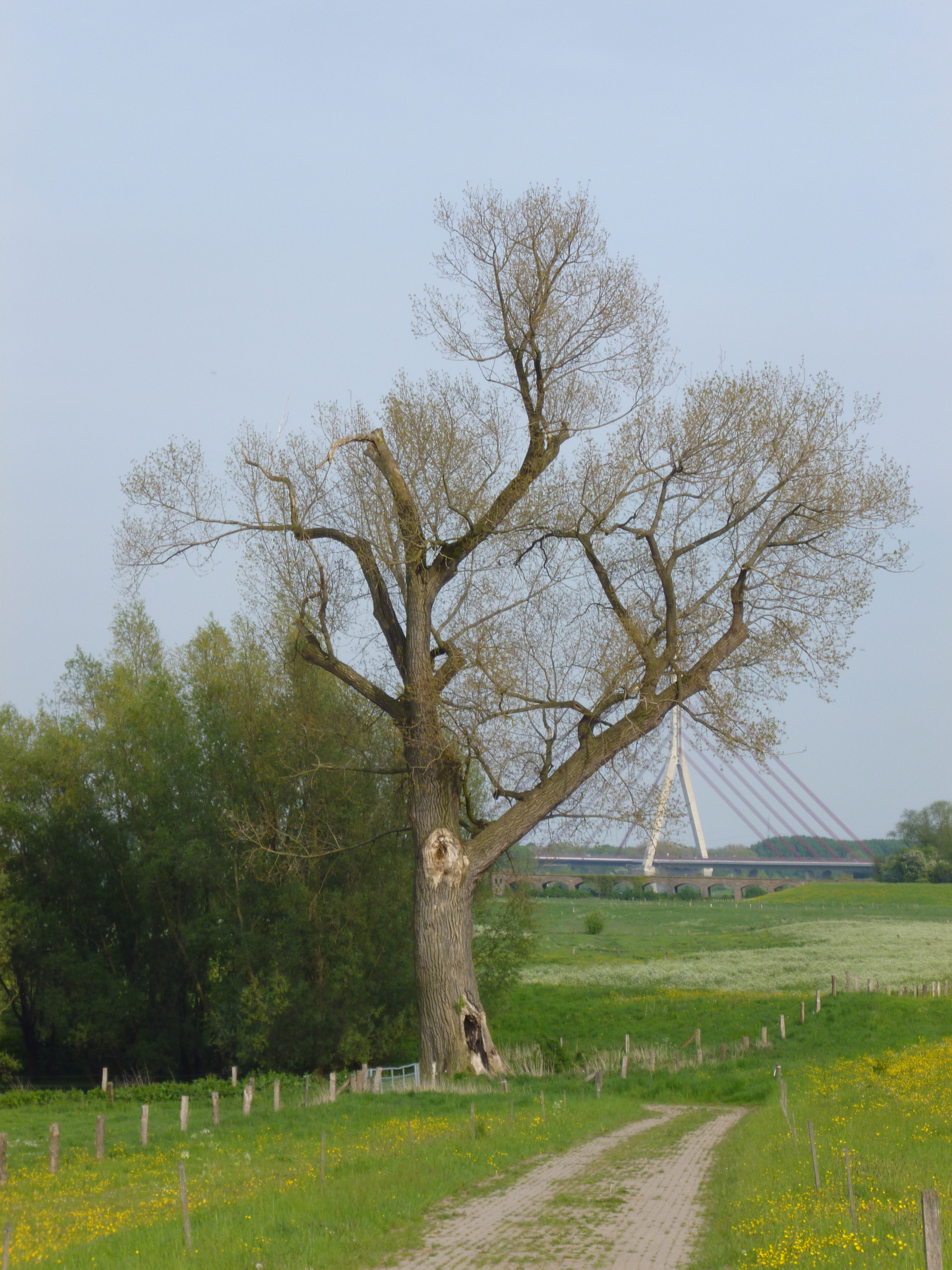 Naturdenkmal „Spätpappel“ (Populus deltoides × nigra) am Pavershof bei Wesel-Perrich, im Hintergrund die Niederrheinbrücke Wesel; Baum im Südostzipfel des FFH-Gebiets DE-4305-303 „Rheinvorland bei Perrich“, Teilfläche des größeren Naturschutzgebiets „Rheinaue zwischen Büderich und Perrich“, zu dem auch die Grünflächen im Hintergrund gehören